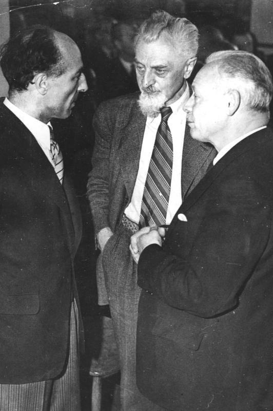 Frankfurt/Main, Tagung des Bizonen-Wirtschaftsrates Von der Tagung des Bi-Zonen-Wirtschaftsrates in Frankfurt/a. Main (Juni 1947) U.B.z.: die Ministerpräsidenten Karl Arnold, Nordrhein-Westfalen, Hermann Lüdemann, Schleswig-Holstein und Christian Stock, Hessen im Gespräch Abgebildete Personen: Lüdemann, Hermann Dr.: Ministerpräsident Schleswig-Holstein, Prozeß 20. Juli 1944, Deutschland Stock, Christian: Ministerpräsident von Hessen, Bundesrepublik Deutschland Arnold, Karl: Ministerpräsident von Nordrhein-Westfalen (NRW), CDU, Bundesrepublik Deutschland